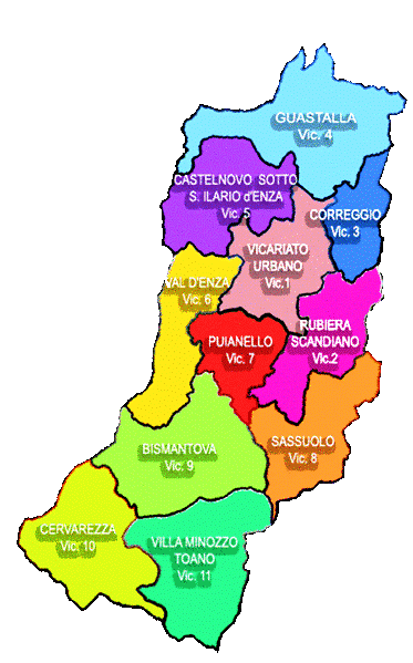 In questa bella fotografia c'è la mappa con tutti gli 11 Vicariati della Diocesi di Reggio Emilia-Guastalla